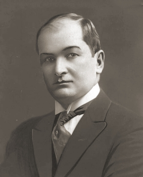 Władysław Mazurkiewicz (ur.1887 - zm. 1963) - prawnik i dyplomata polski, ambasador w Argentynie i Chile.